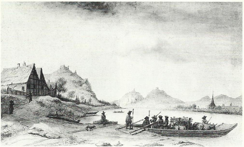 Rheinlandschaft mit Insel und Kloster Rolandswerth (heute Nonnenwerth; rechts), links: Rolandswerth mit St. Nikolaus-Hospital, Hintergrund: Siebengebirge, lavierte Federzeichnung